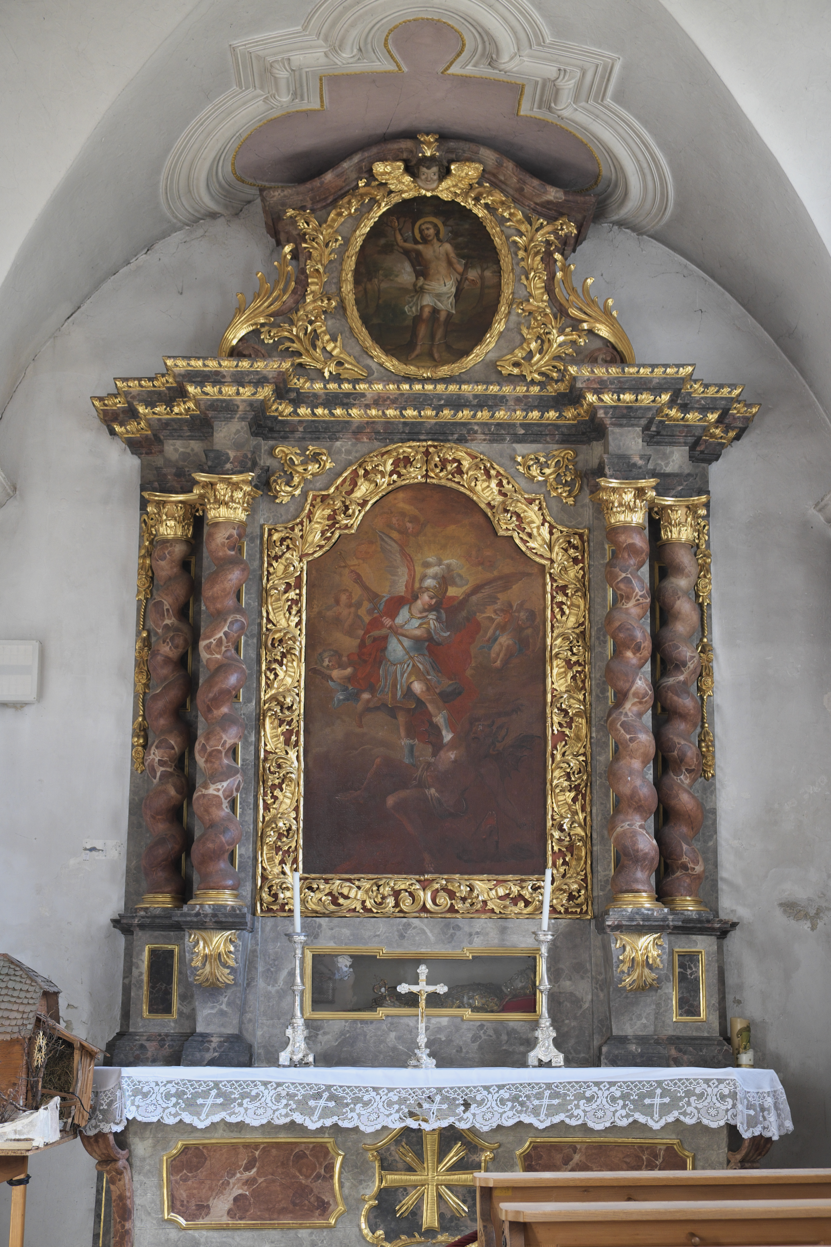 Katholische Pfarrkirche Mariä Himmelfahrt in Essenbach im Landkreis Landshut (Bayern/Deutschland), Altar